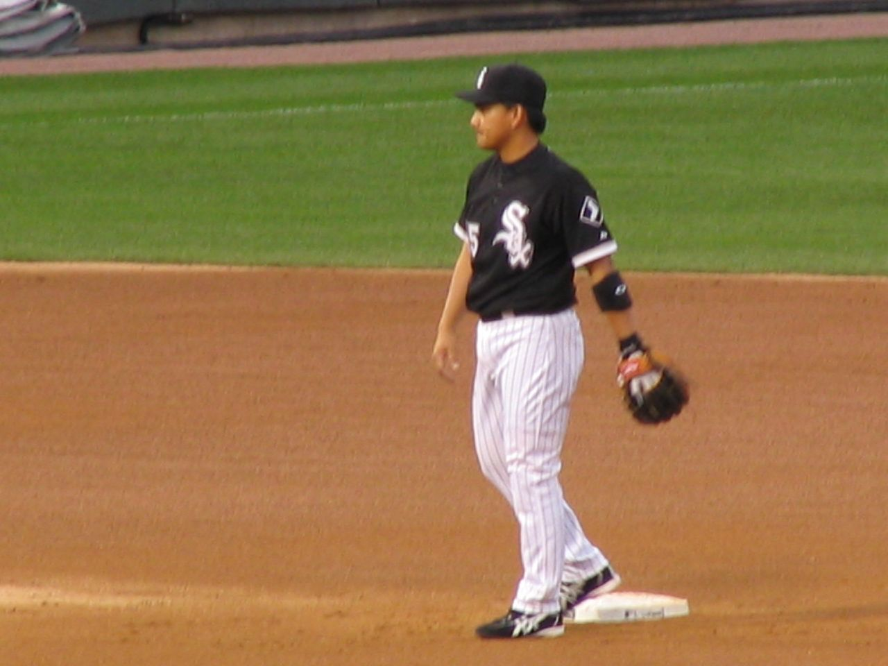 Tadahito Iguchi